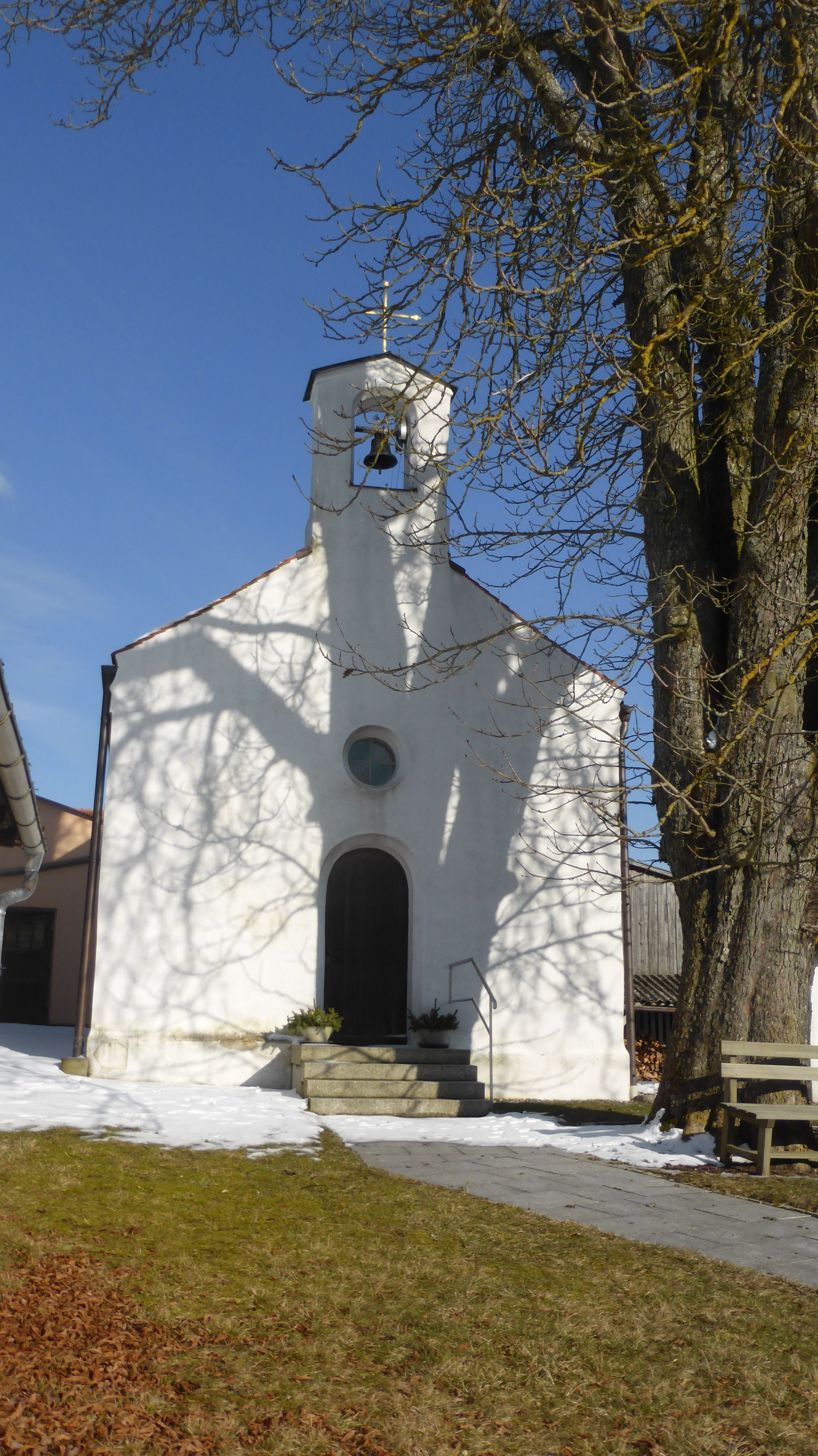 Hitzendorf (Hohenfels), Nebenkirche